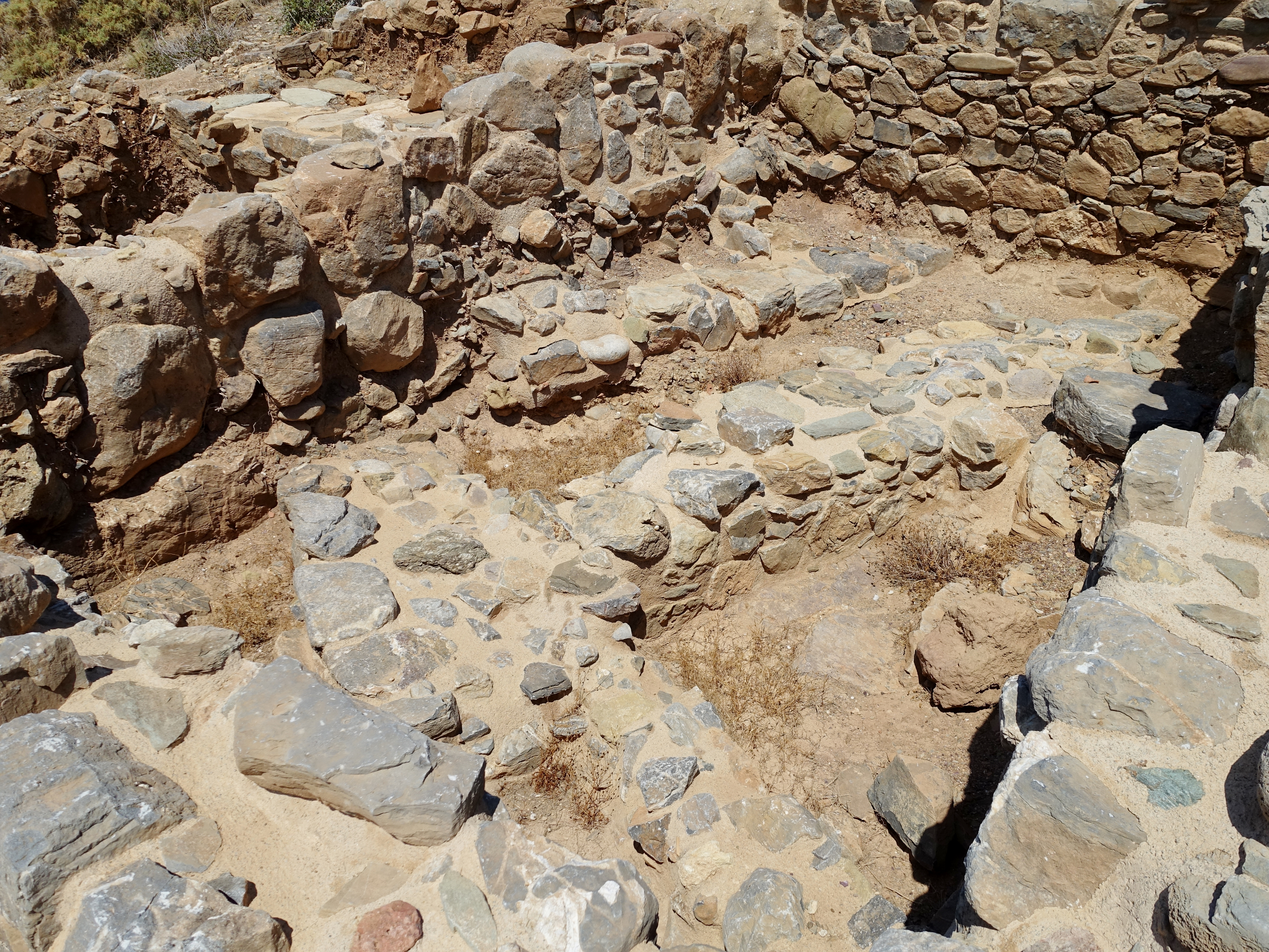 Ausgrabungsstätte auf der Insel Agios Nikolaos (Άγιος Νικόλαος) vor Mochlos (Μόχλος), Kreta, Griechenland